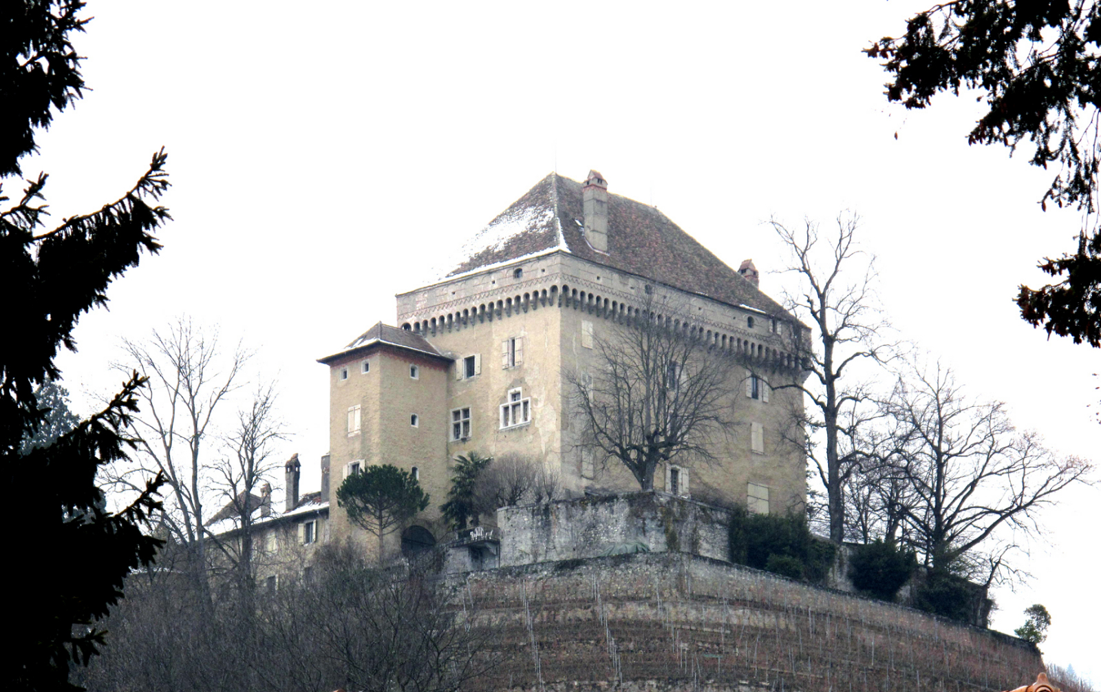 Montreux, château du Châtelard